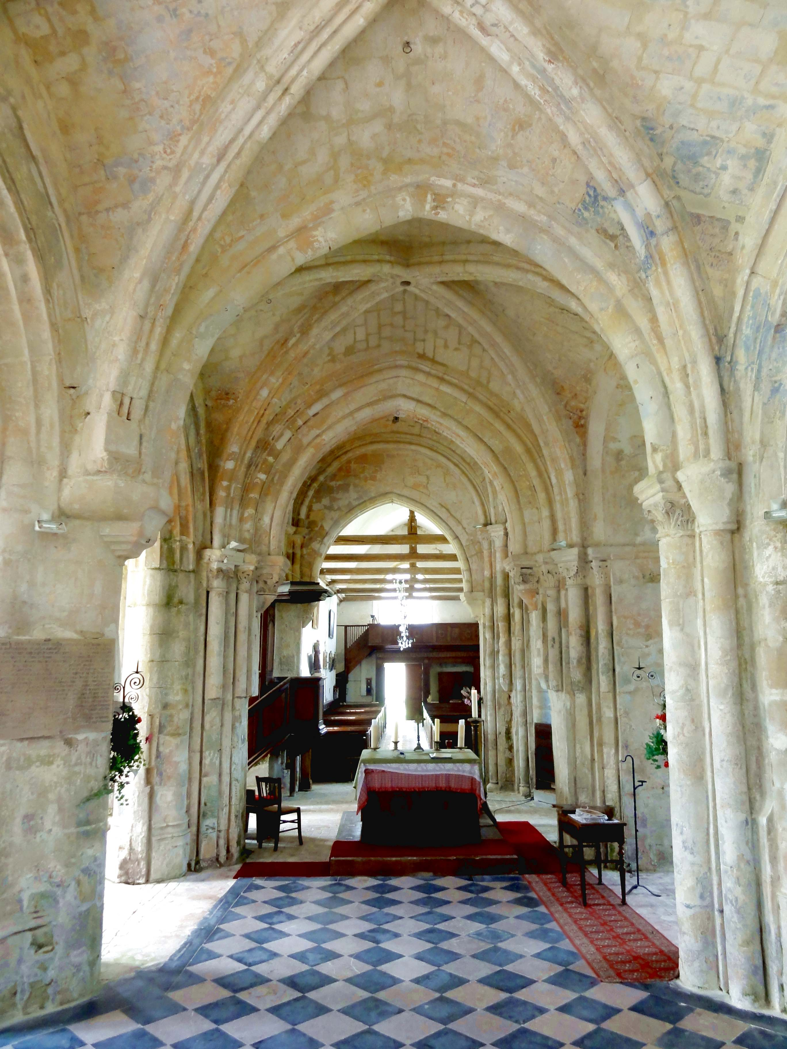 Intérieur de l'église - voir titre.